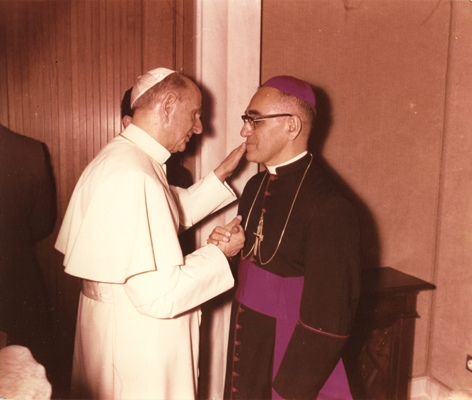 Monseñor Romero junto al papa Pablo VI. Aproximadamente un año antes de la muerte del pontífice.